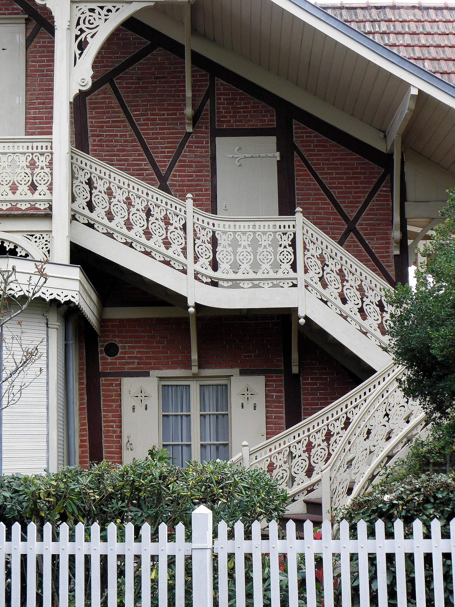 Villa Toledo, Arcachon (33).